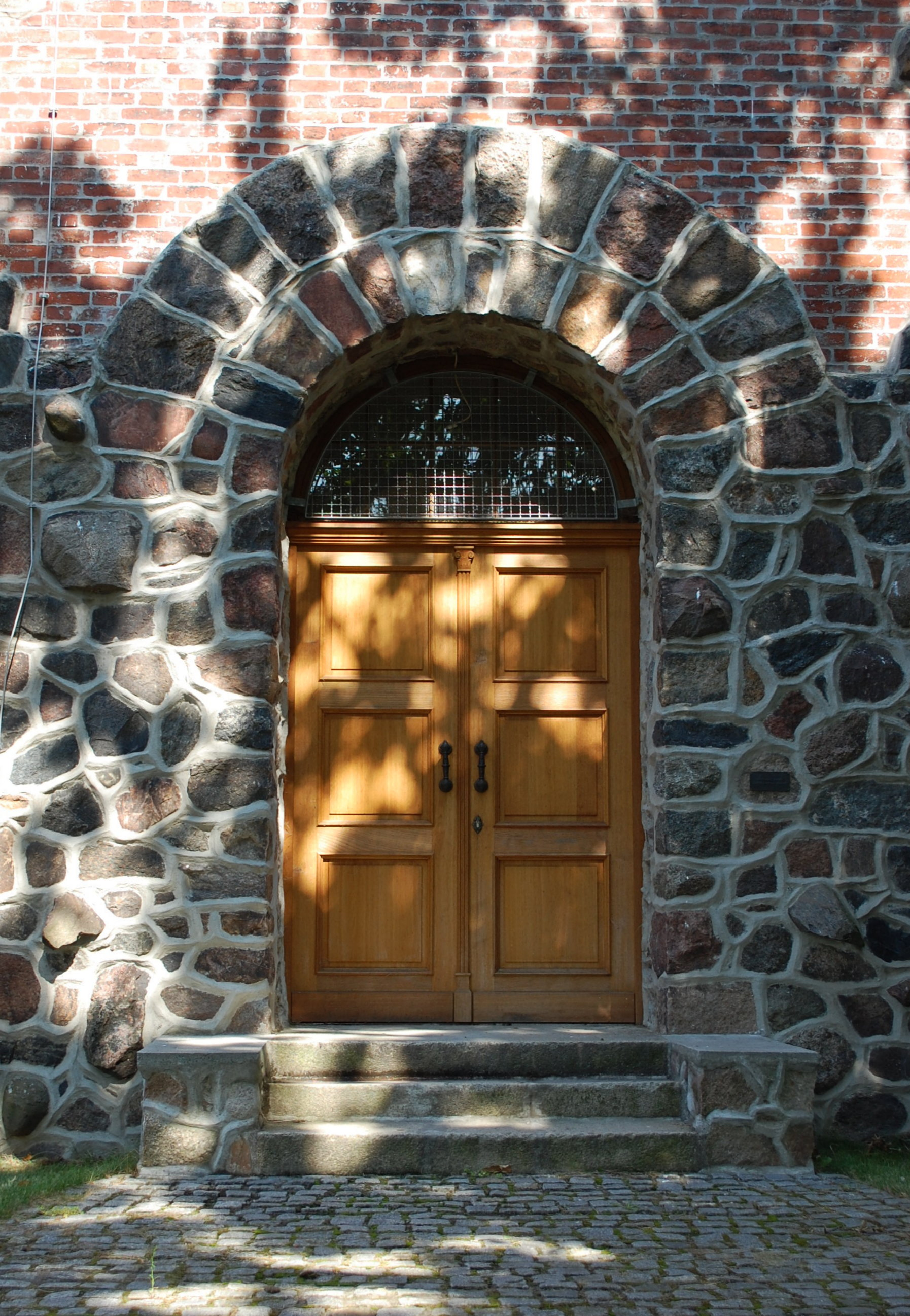 Bismarckturm bei Burg